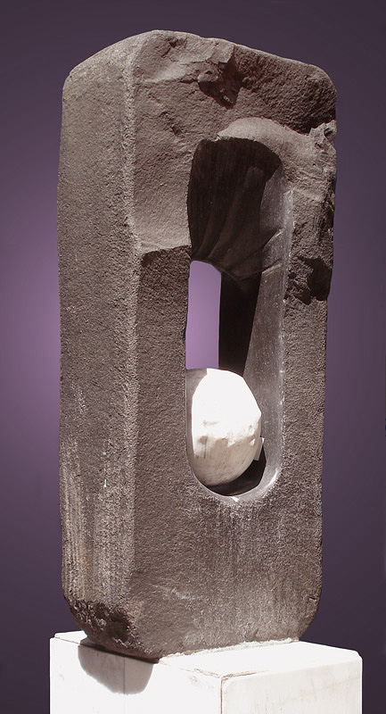 Obra de Francisco Stockinger na esquina das ruas da Ladeira e Sete de Setembro, Porto Alegre, Brasil. Década de 90. Fundo editado